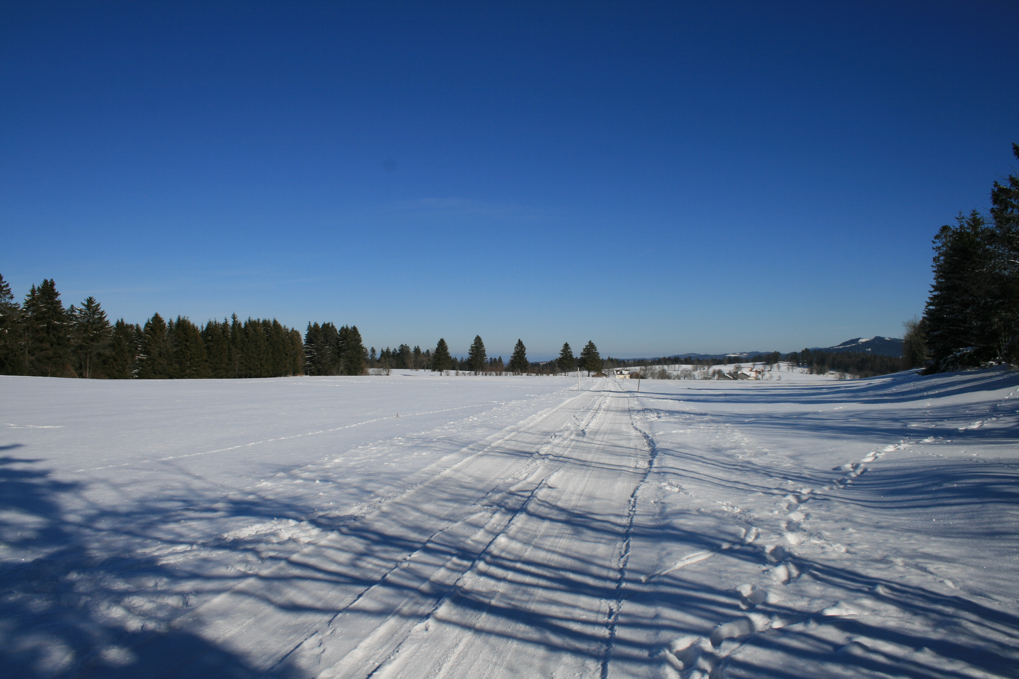 Montbautier ob Le Fuet im Winter